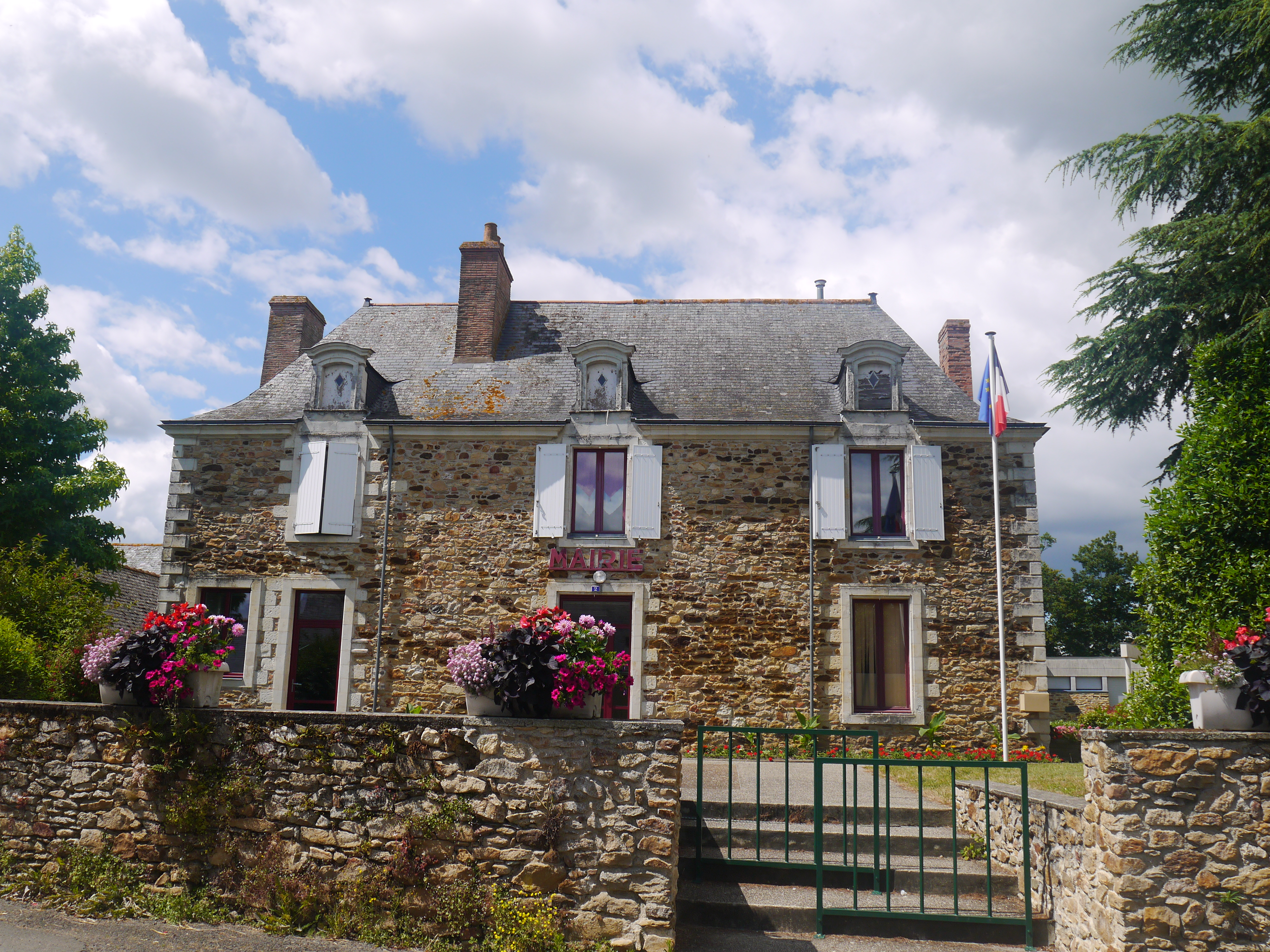 La mairie.